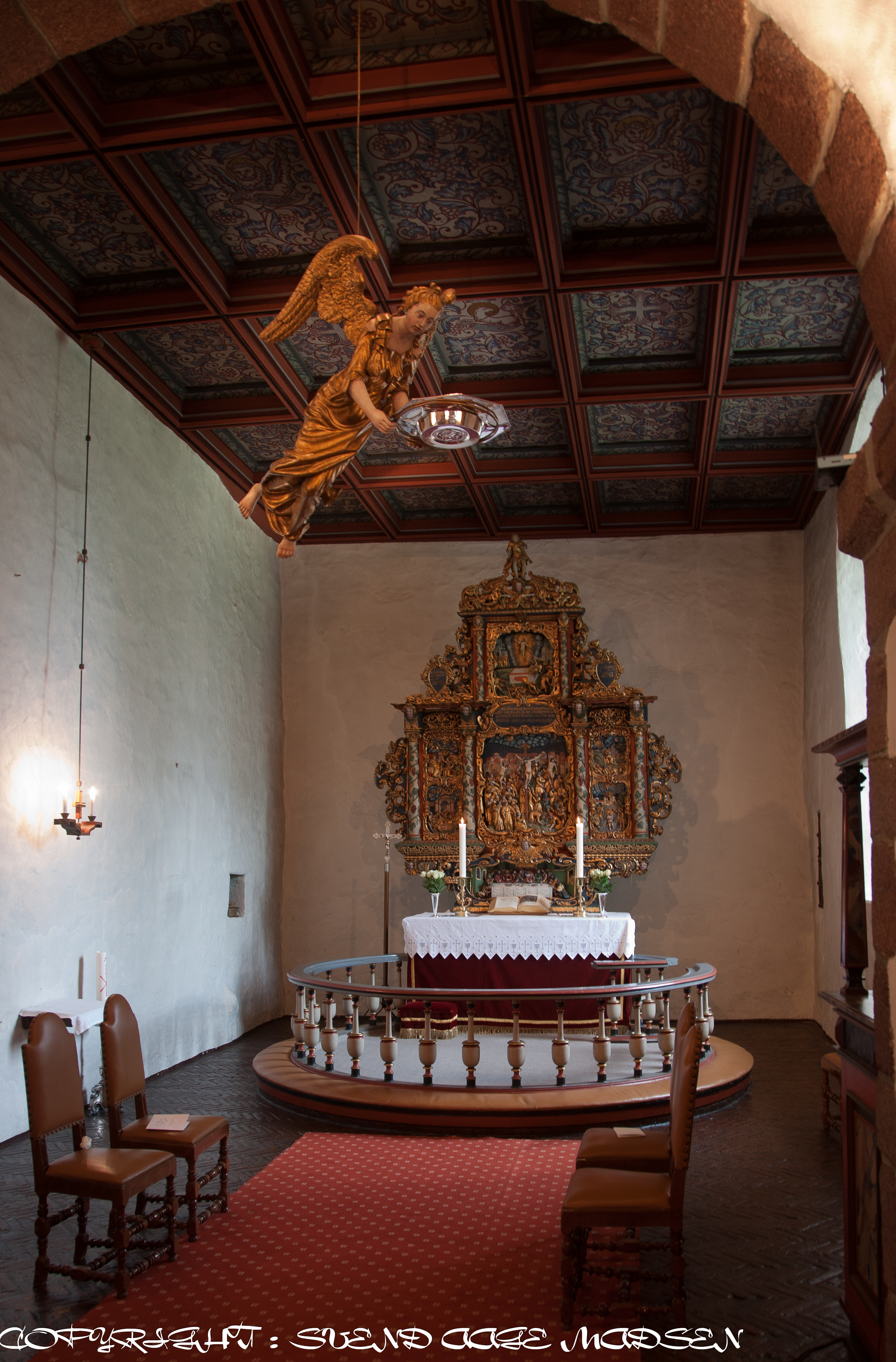 Borre kirke / Borre church in Horten, Norway